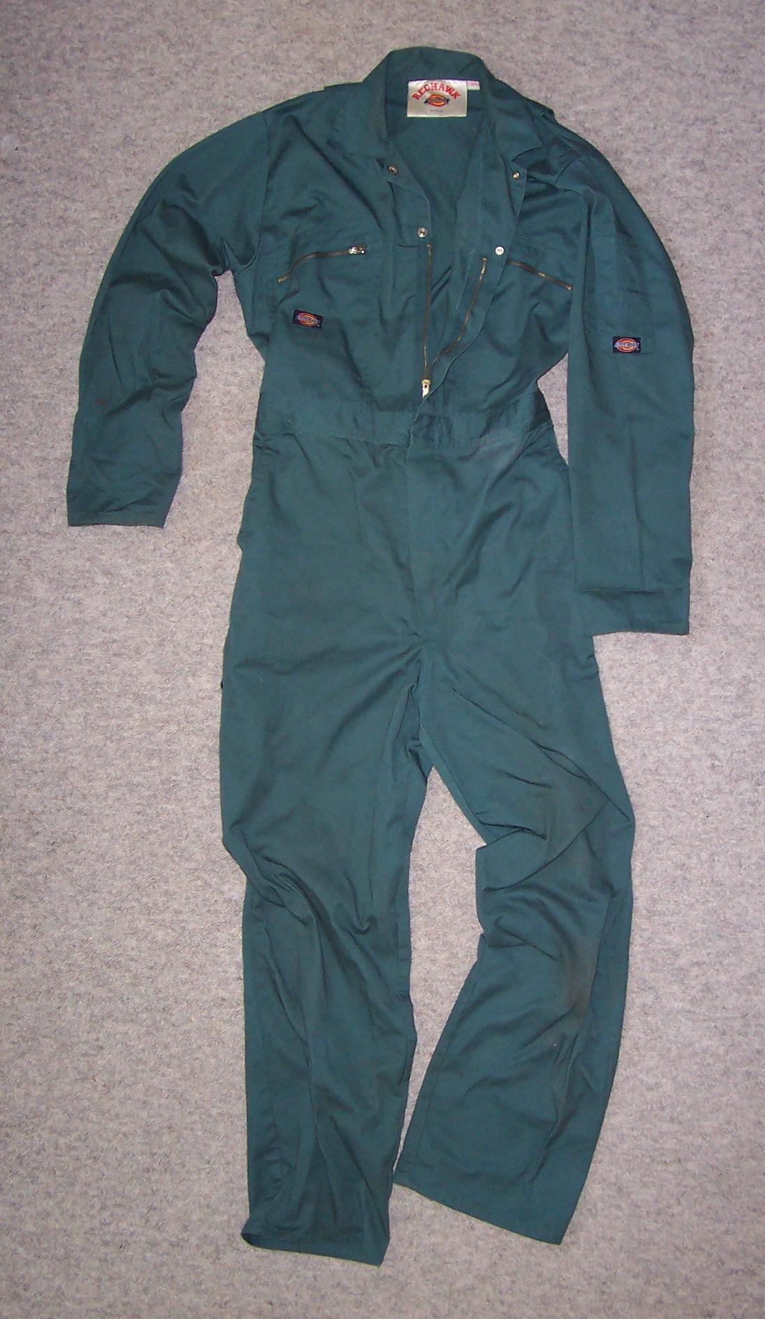 Boilersuit coveralls.